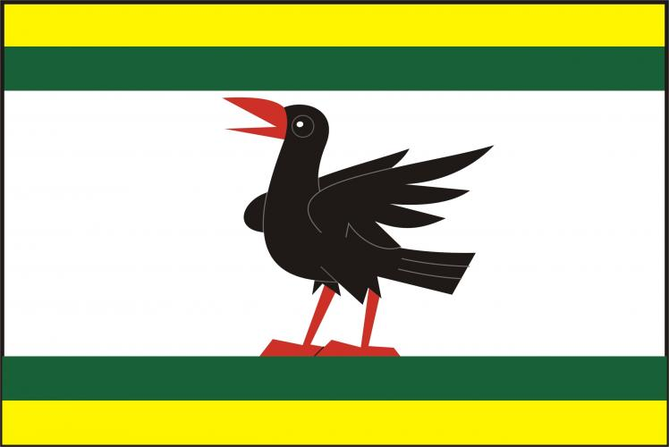 vlajka, Hraběšice, okres Šumperk